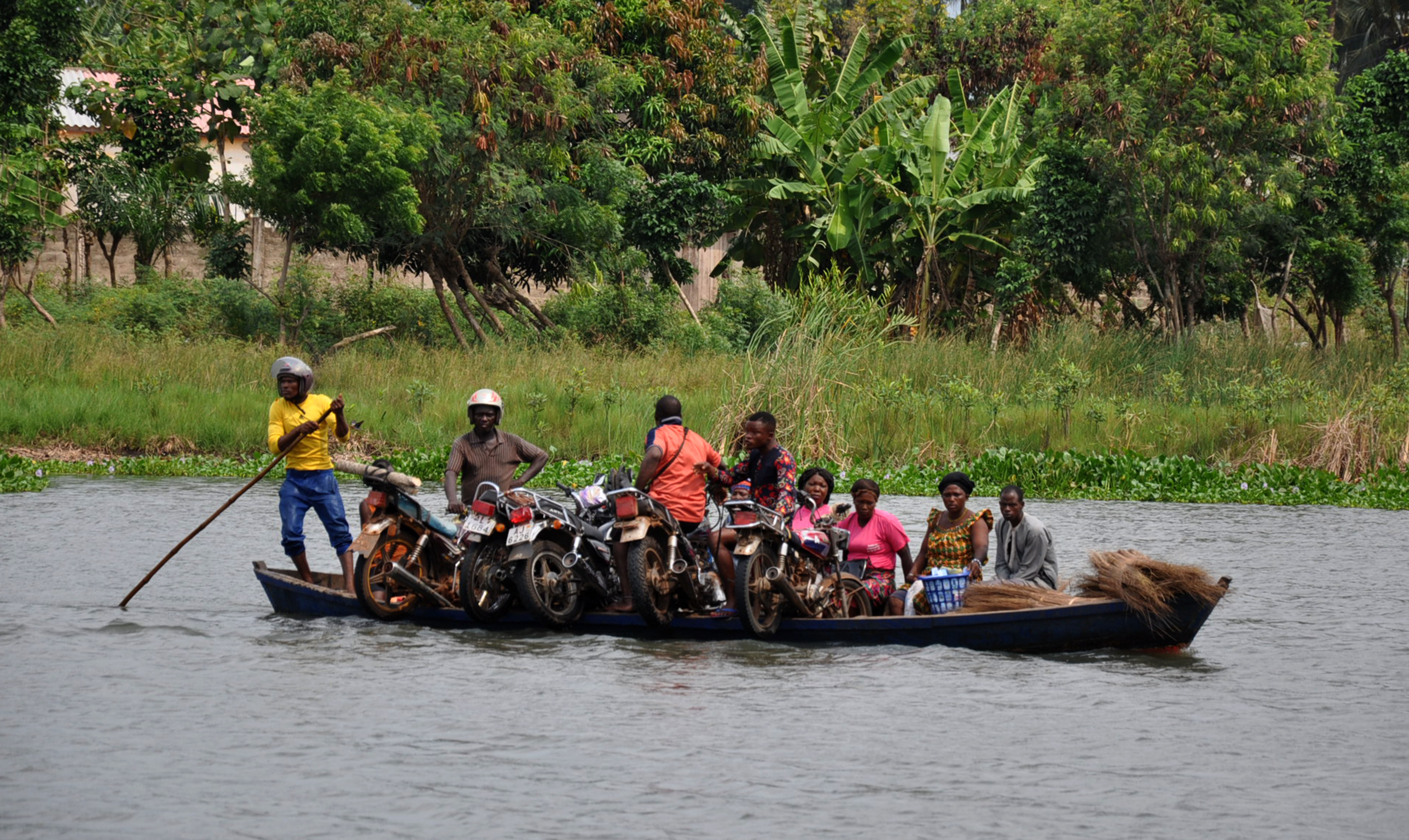 en traverssant la fronctière Bénin-Togo ces riverains utilisent la pirogue pour faire passer leurs motos This is an image with the theme "Africa on the Move or Transport" from: Benin